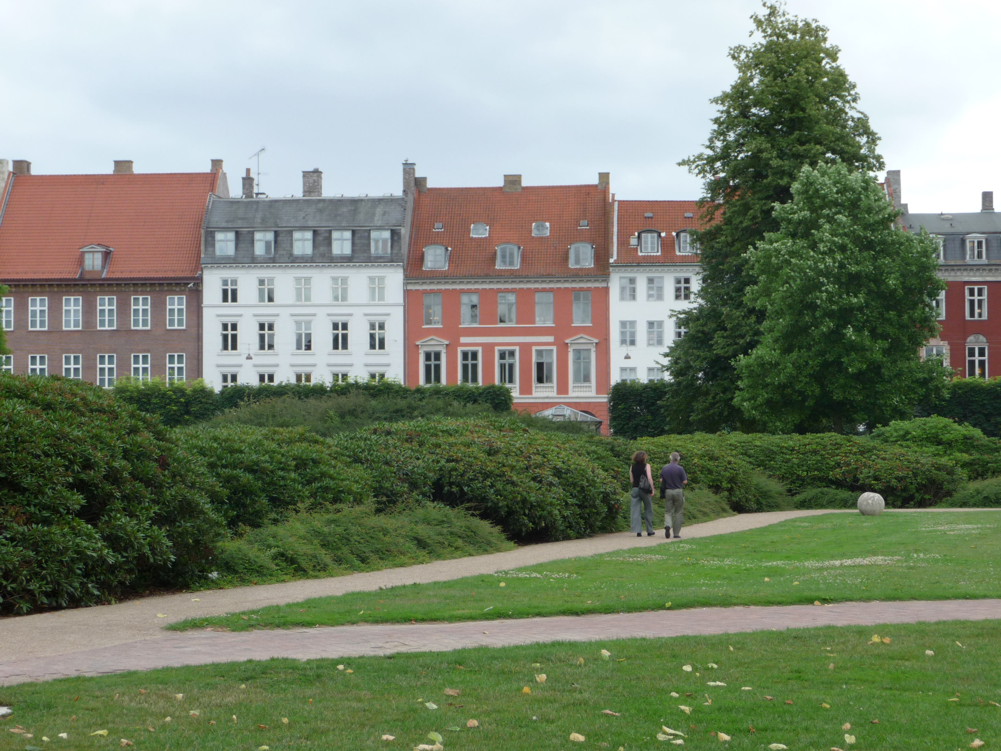 Facades of Kronprinsessegade viewed from Kongens Have in Copenhagen, Denmark